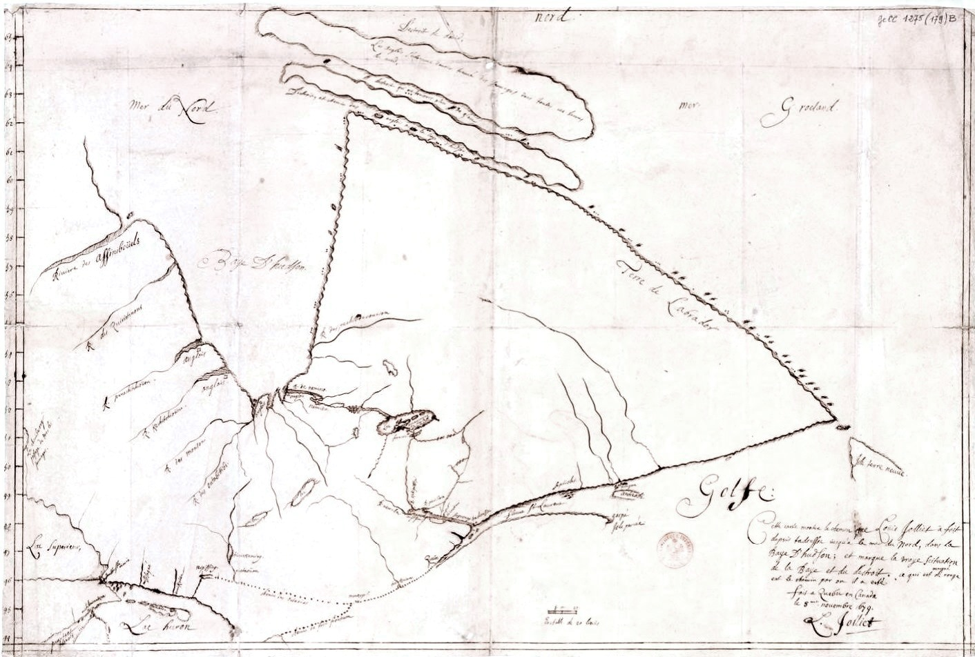 Cette carte montre le chemin que Louis Jolliet a fait depuis Tadoussac iusqu'à la Mer du Nord, dans la Baye D'hudson, et marque la vraye scituation de la Baye et du destroit; ce qui est marqué de rouge est le chemin par ou il a esté. Fait à Québec en Canada le 8ème novembre 1679. / [Signé:] L. Jolliet